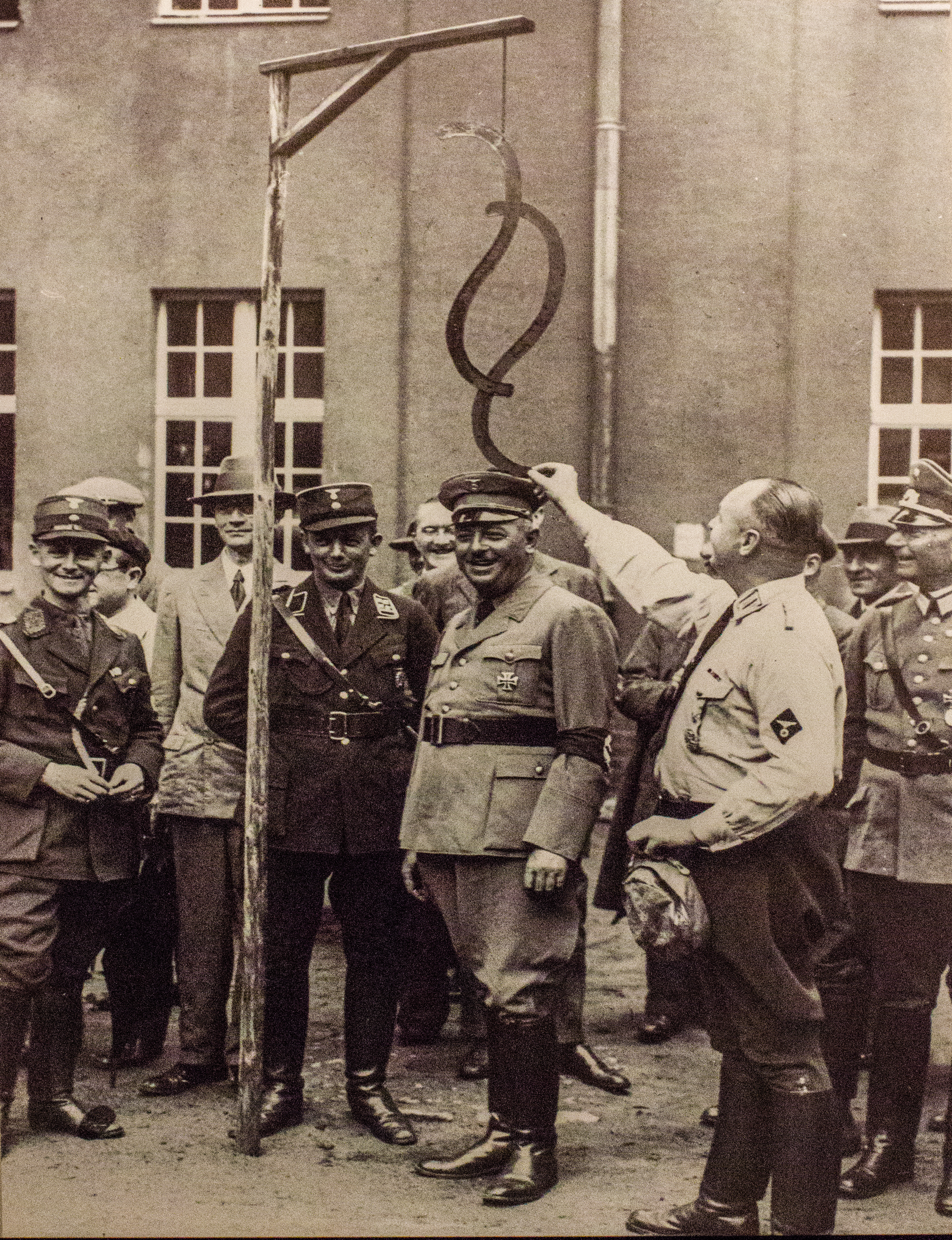 Die angehenden Juristen hatten im Hof das Symbol der Justiz, einen Paragraphen, am Galgen aufgehängt. Aufnahmedatum: 1934 Aufnahmeort: Jüterbog Quelle: Gedenkstätte Esterwegen, Bildarchiv preußischer Kulturbesitz